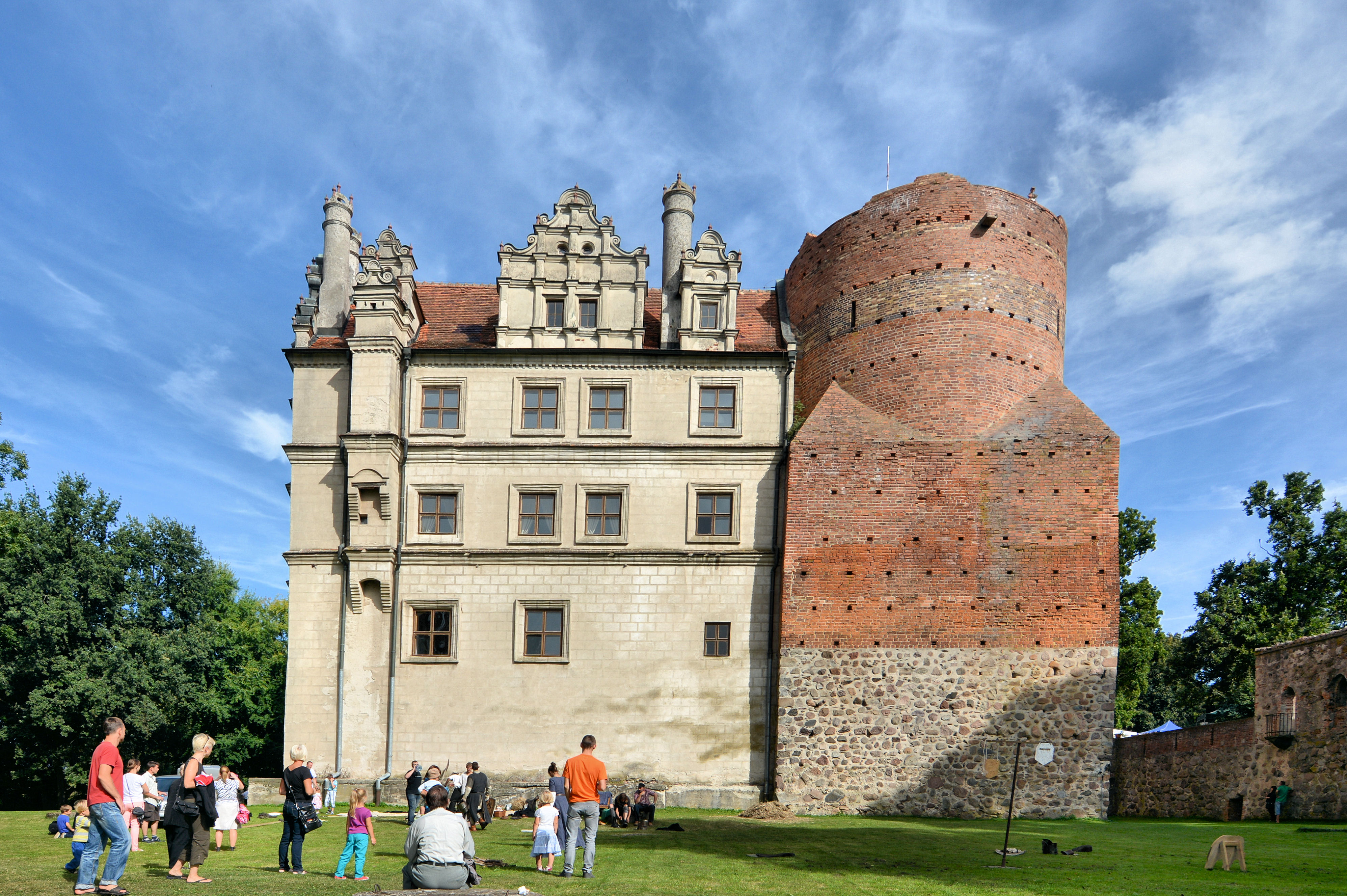 Zamek w Pęzinie